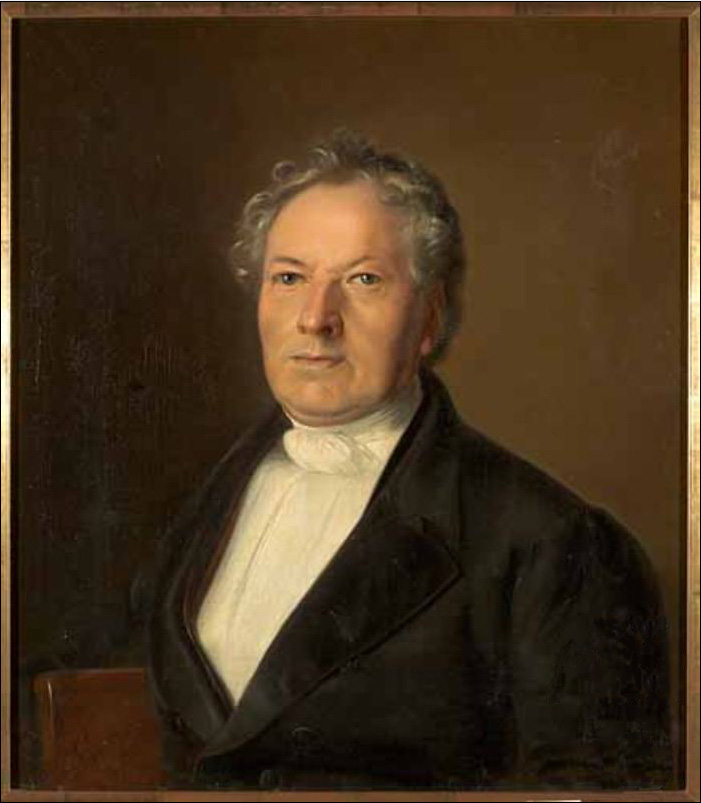 Anoniem/Anonymous schilder en tekenaar Christoffel Steitz de Wilde (1784-1860)